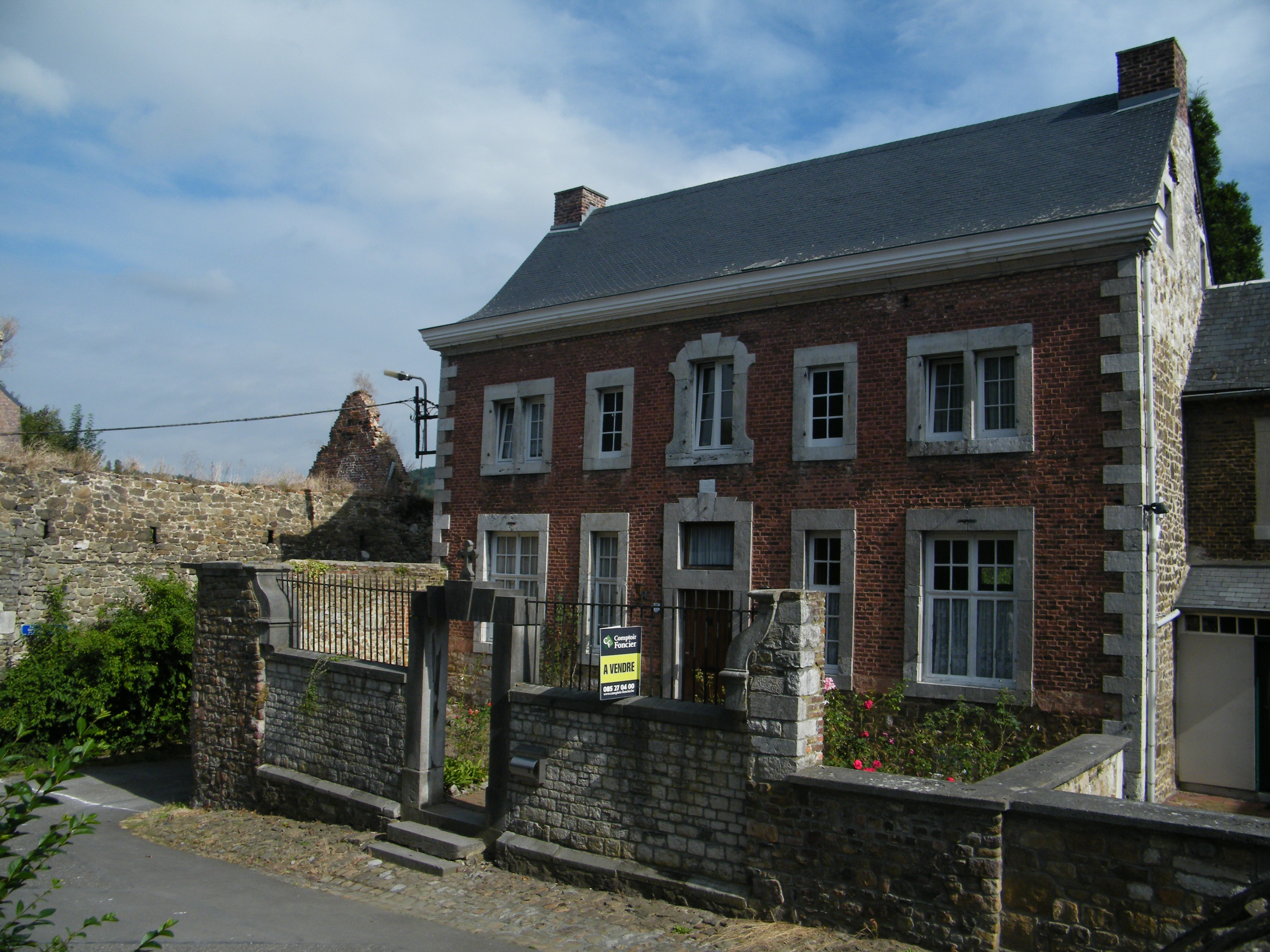 Presbytère d'Hermal-sous-Huy